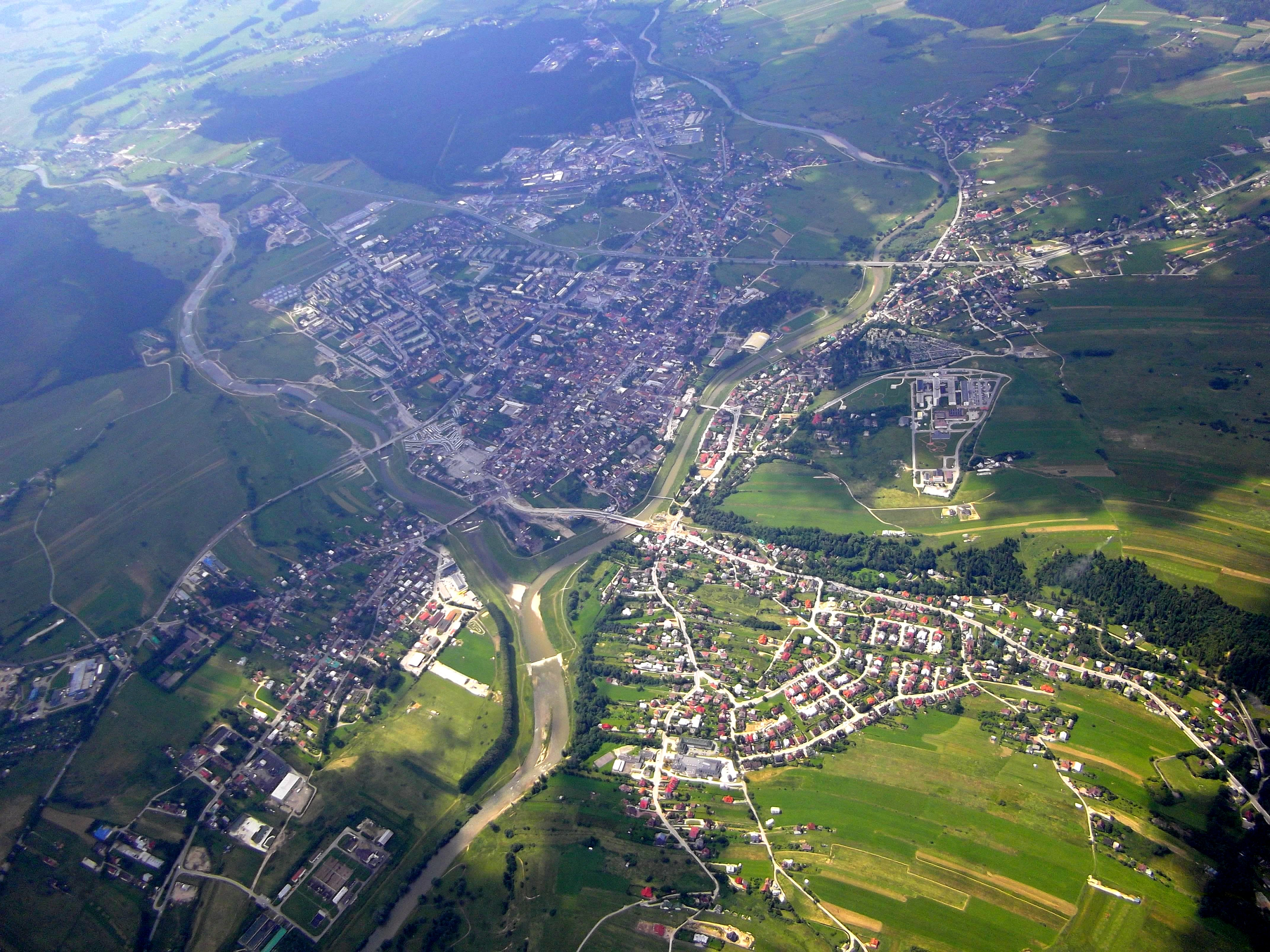 Widok na miasto Nowy Targ z lotu ptaka